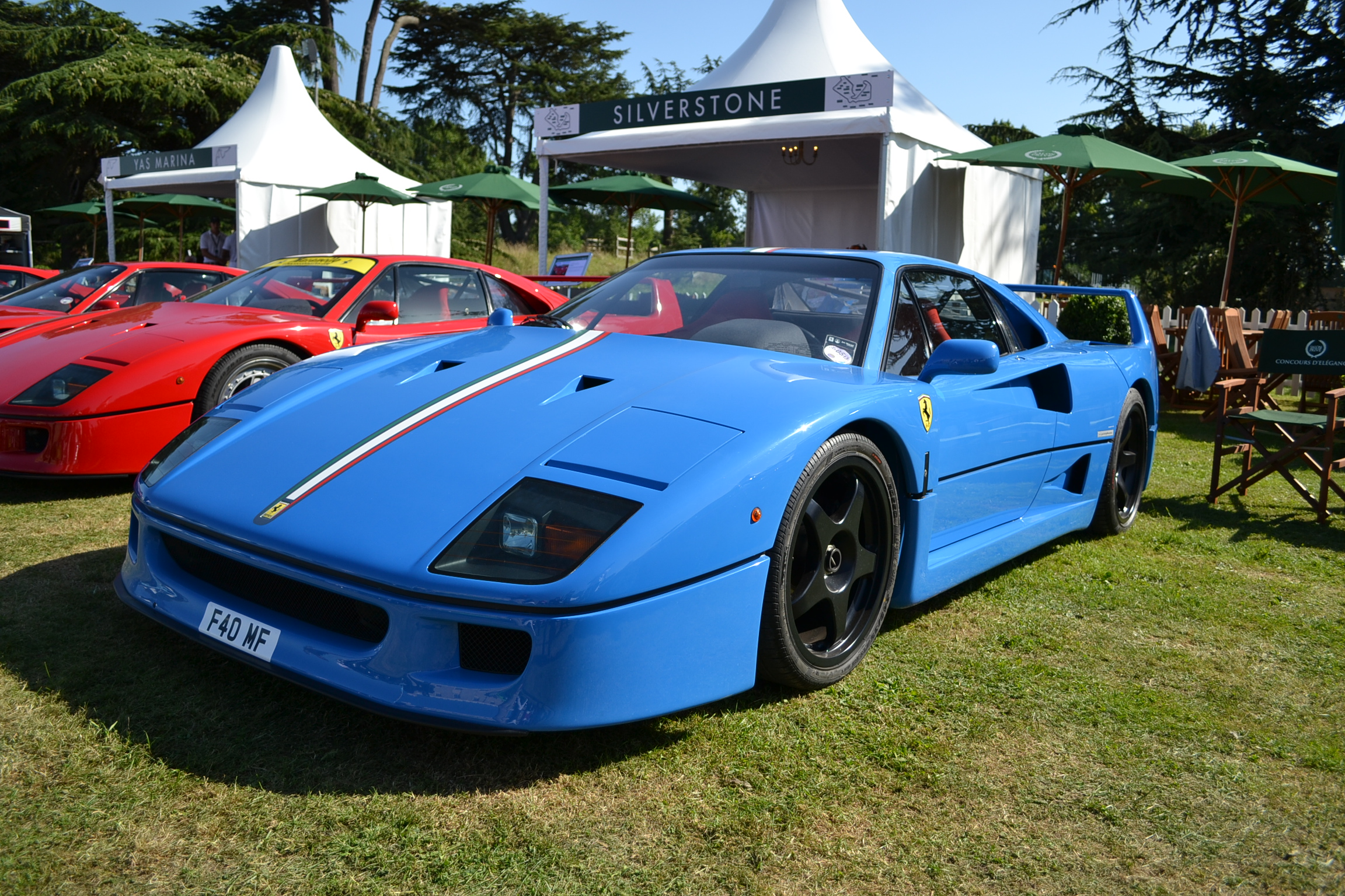 Salon Privé London 2012